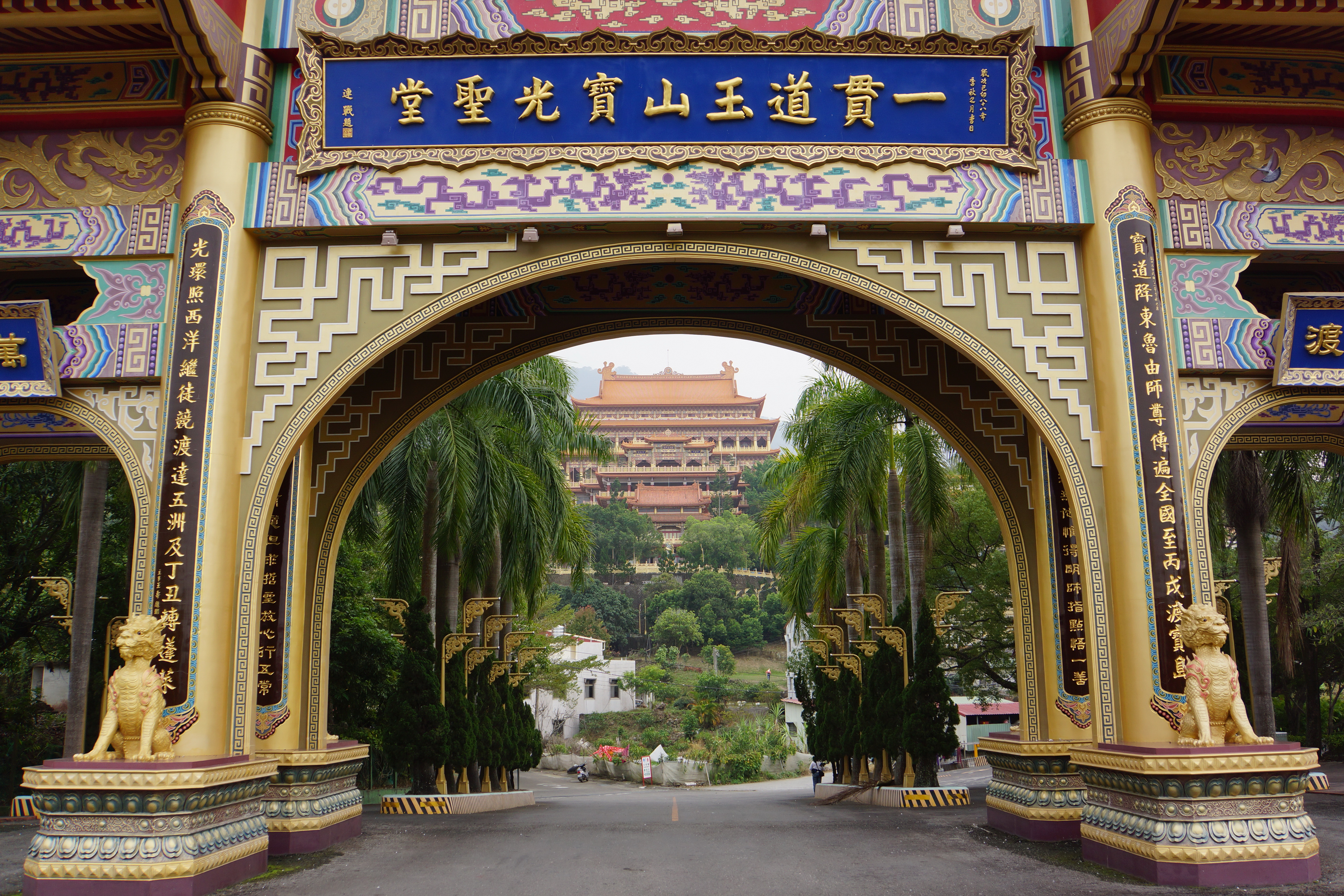 一貫道玉山寶光聖堂 Yiguangdao Yushan Baoguang Temple